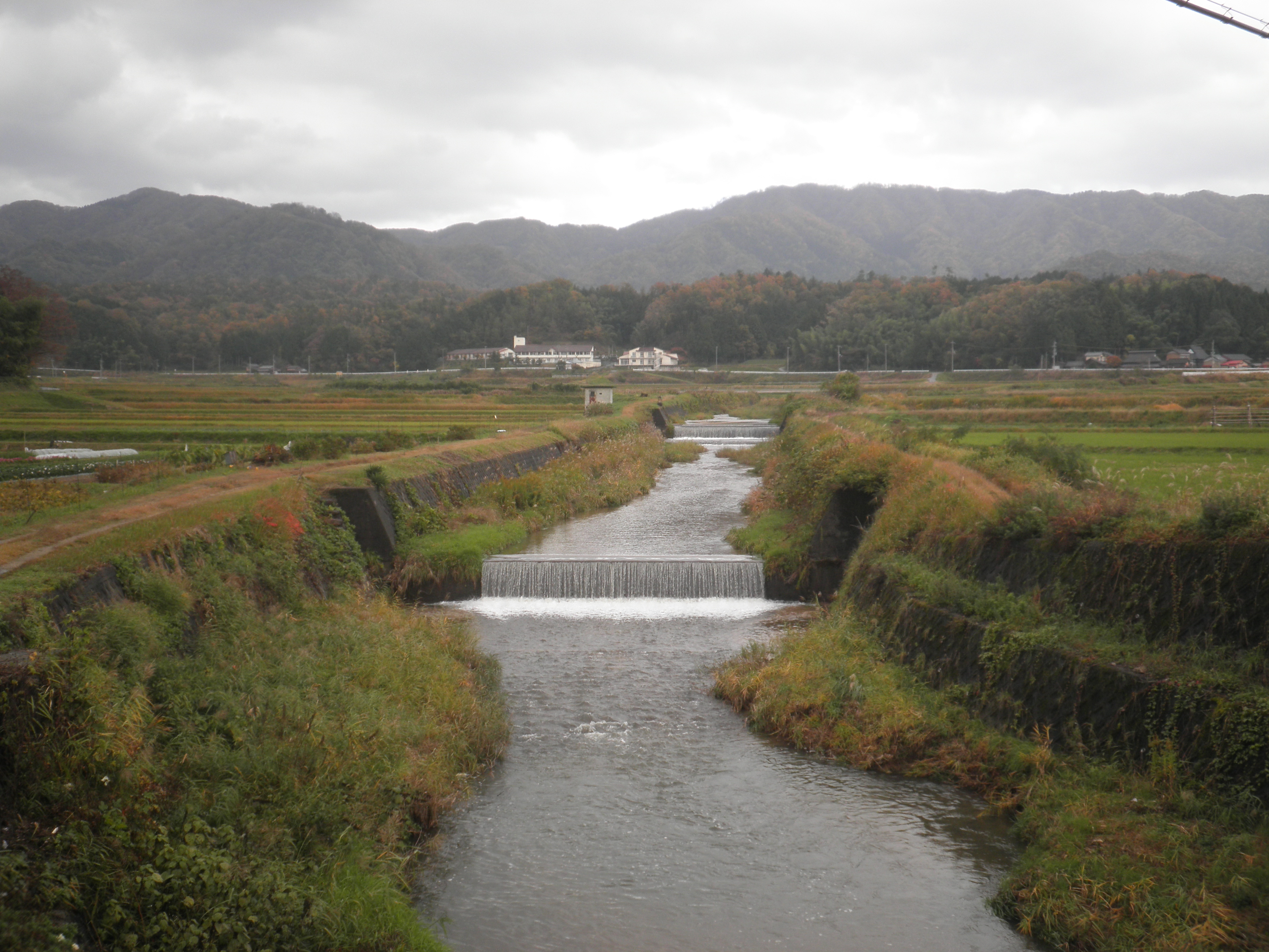 丹後半島を流れる竹野川。中流部のja:京丹後市大宮町明田にて撮影